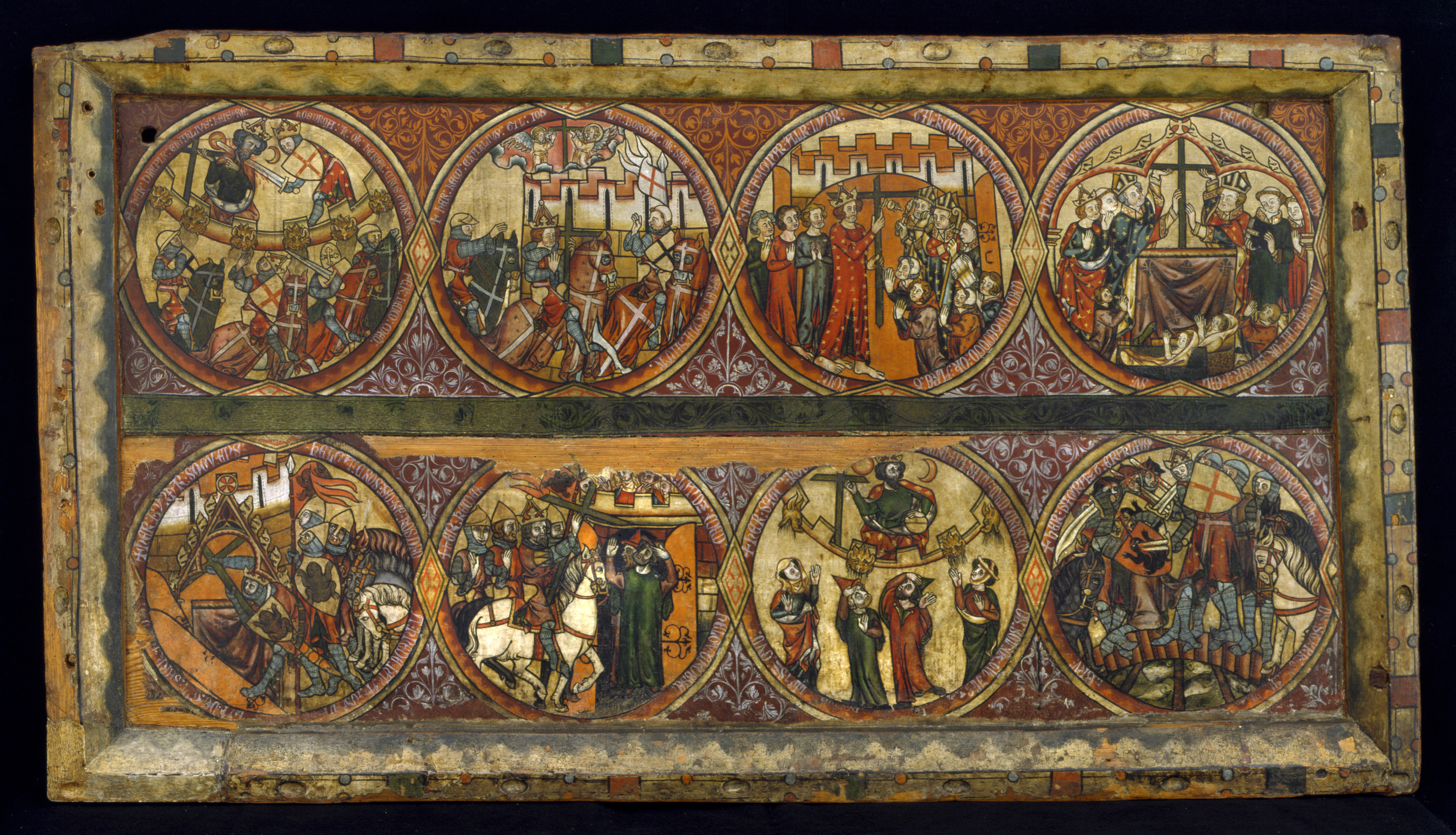 Alterfronten i Nedstryn kirke ble flyttet til Bergen Museum på 1800-tallet og forestiller kong Heraklius' gjenerobring av korset. I 2020 flyttet frontalen tilbake til Nedstryn kirke.